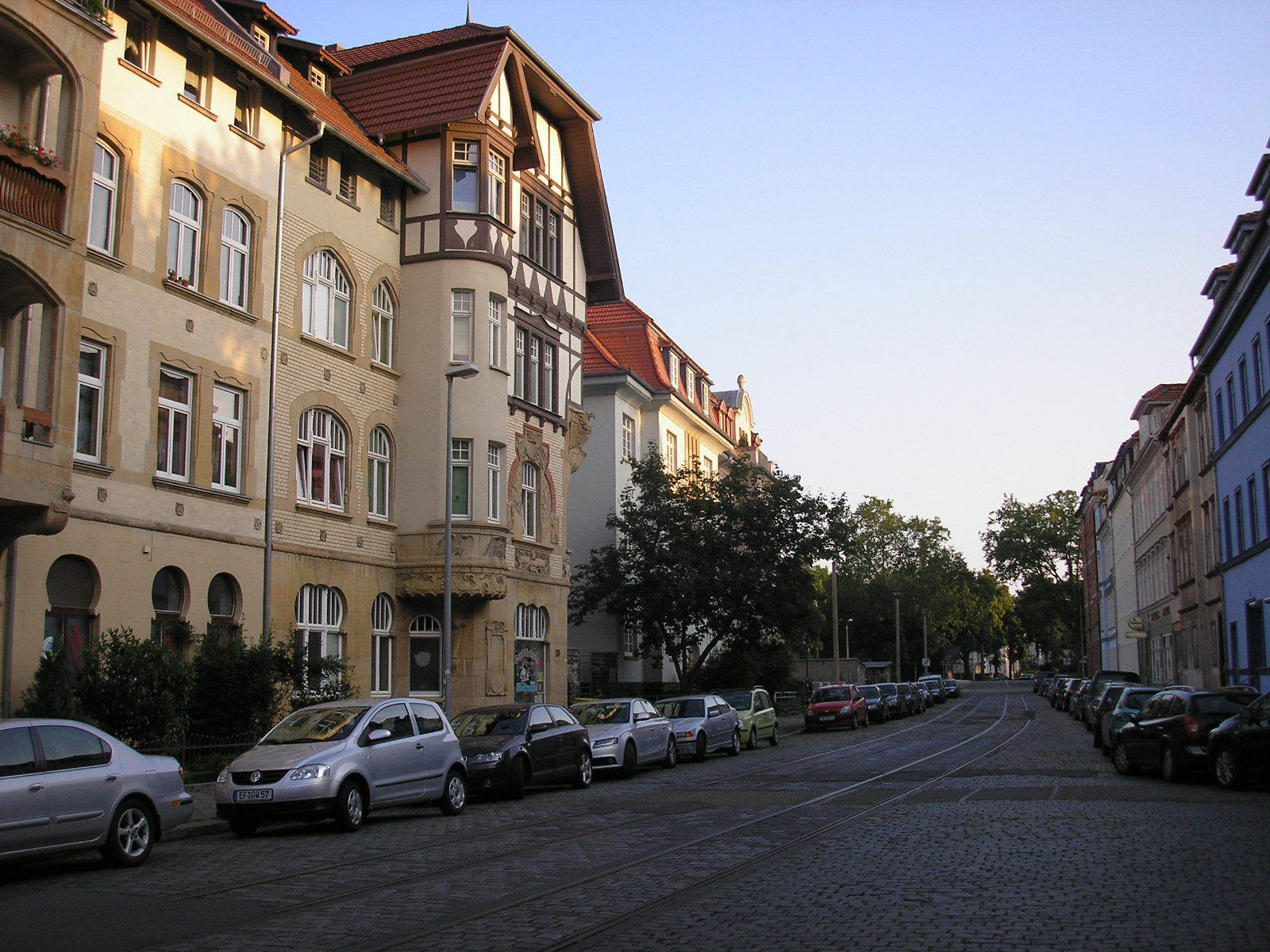 Der Dalbergsweg mit stillgelegter Straßenbahnstrecke in Erfurt.